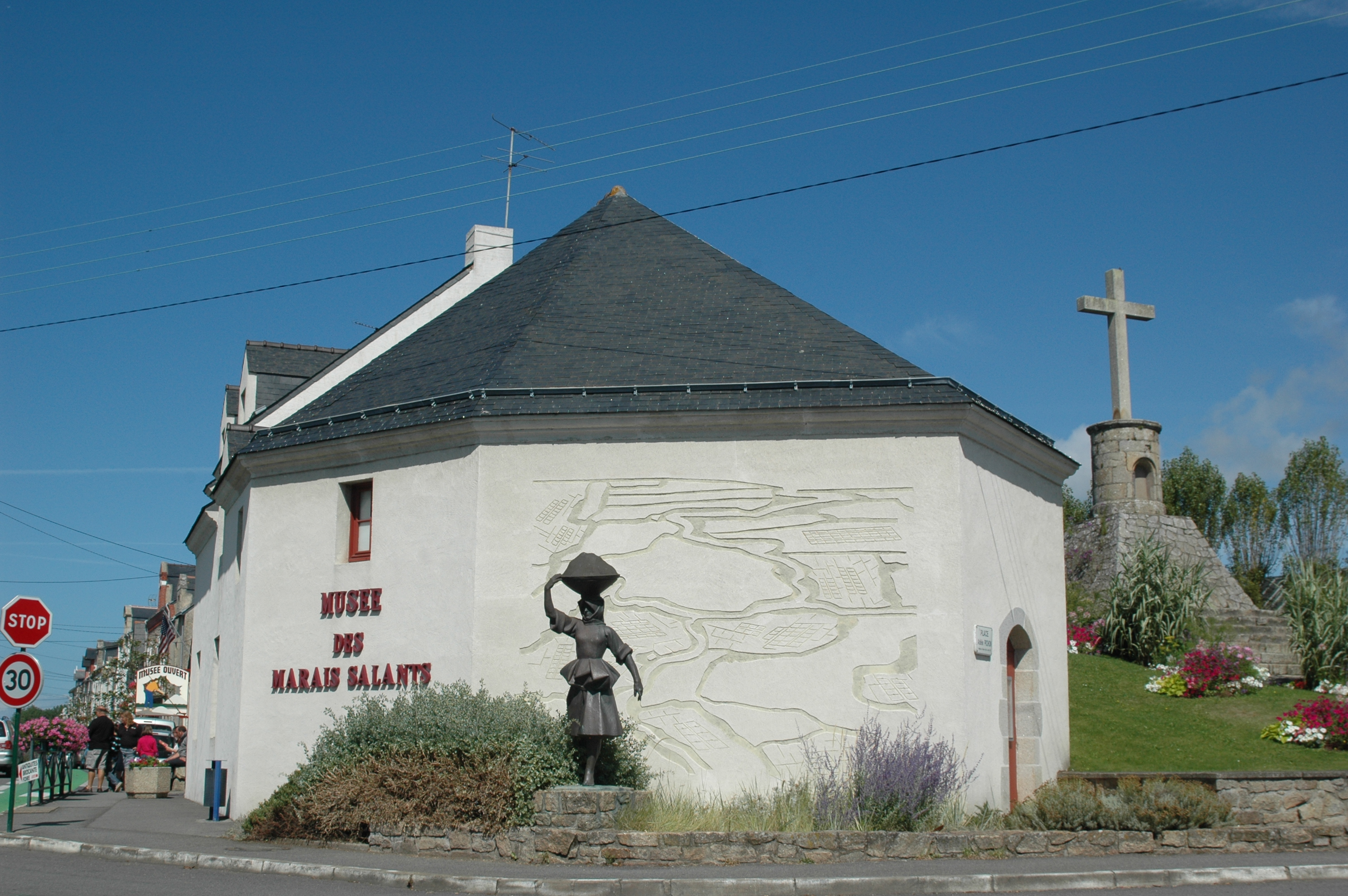 Batz-sur-Mer, le musée des marais salants